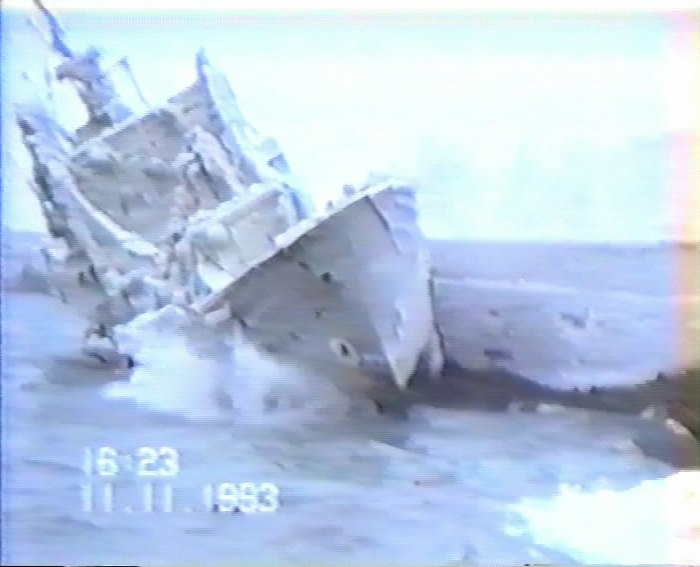 После боры, Новороссийск 1993г